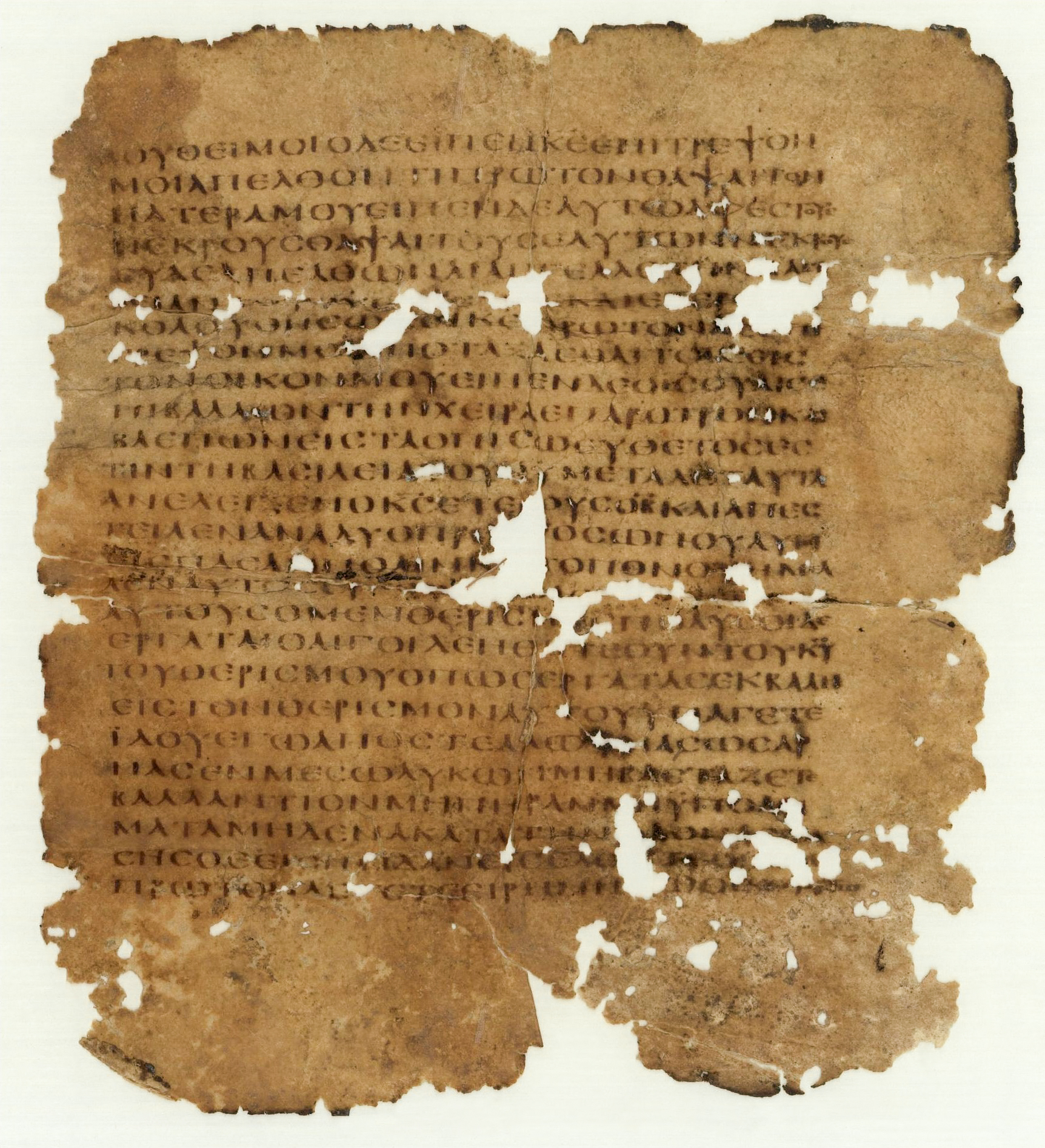 side recto of the fragment with the text of Luke 9:59-10:5